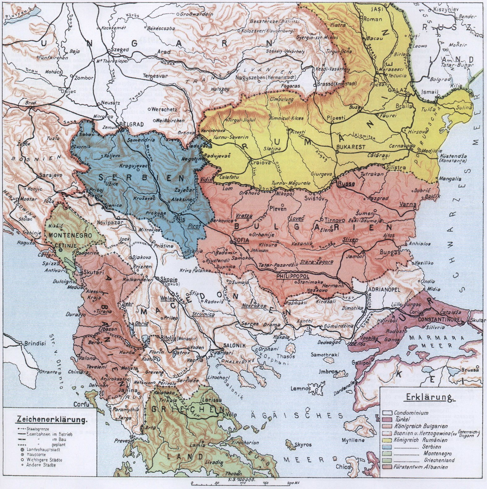 Автор:Димитър Ризов (1862-1918) Карта от атласа на Димитър Ризов "Българите в техните исторически етнографически и политически граници", Берлин, 1917.